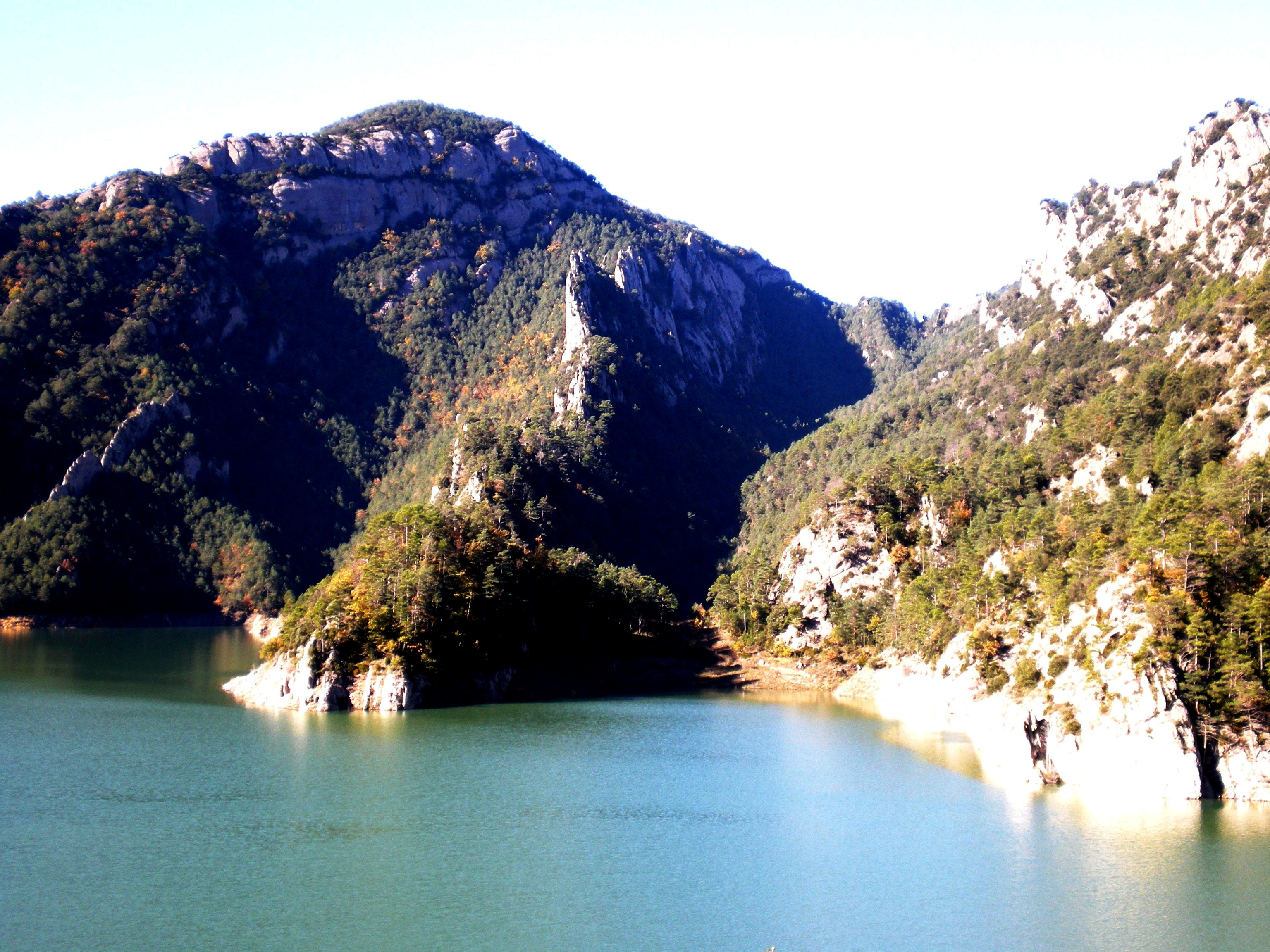 Al centre de la imatge, la Riera de Sobirana. A la seva esquerra, les crestes de La Sobirana. Darrere seu, el Tossal de Vall-llonga. Al peu de la foto, l'embassament de la Llosa del Cavall